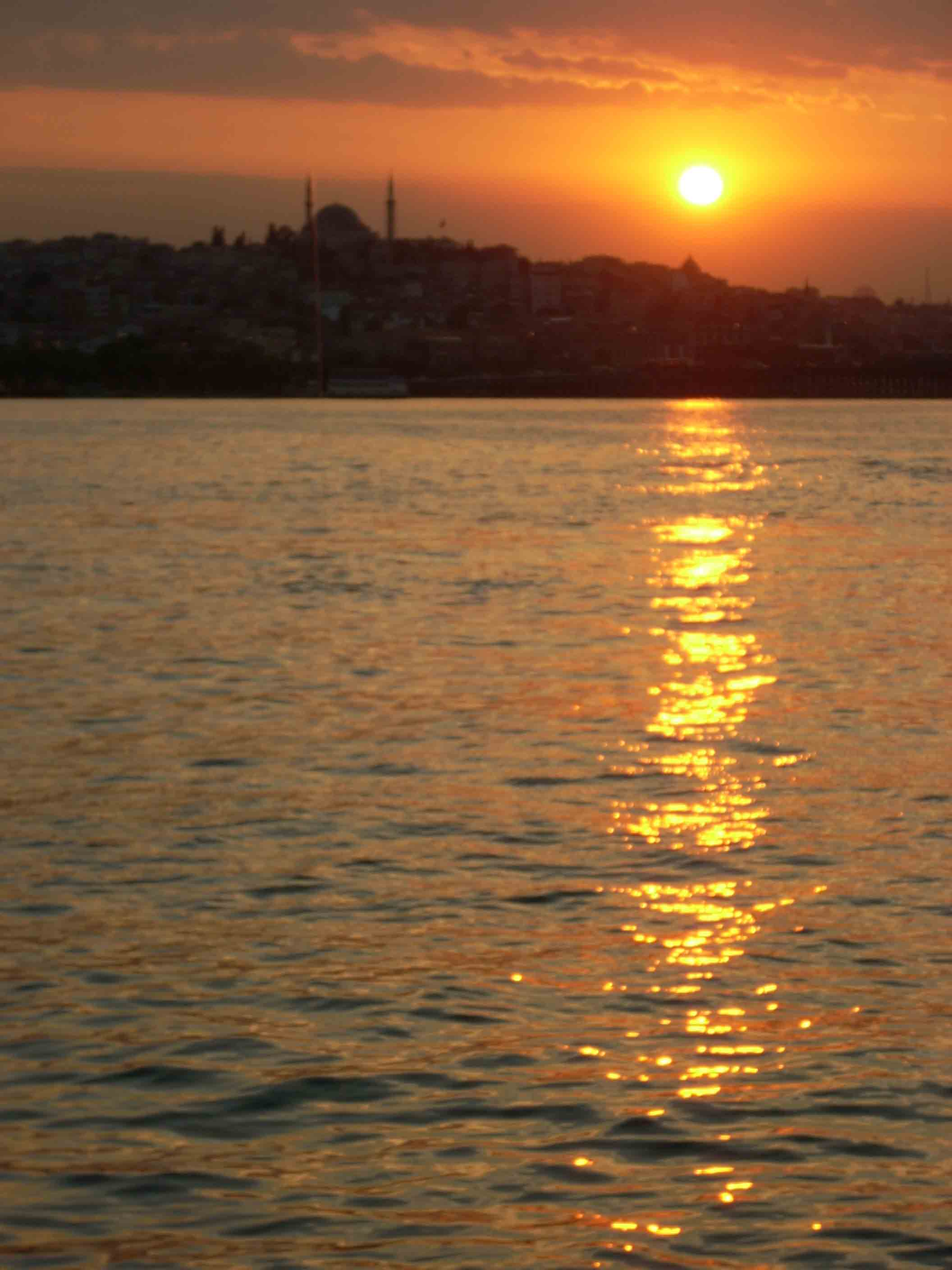 Istambul